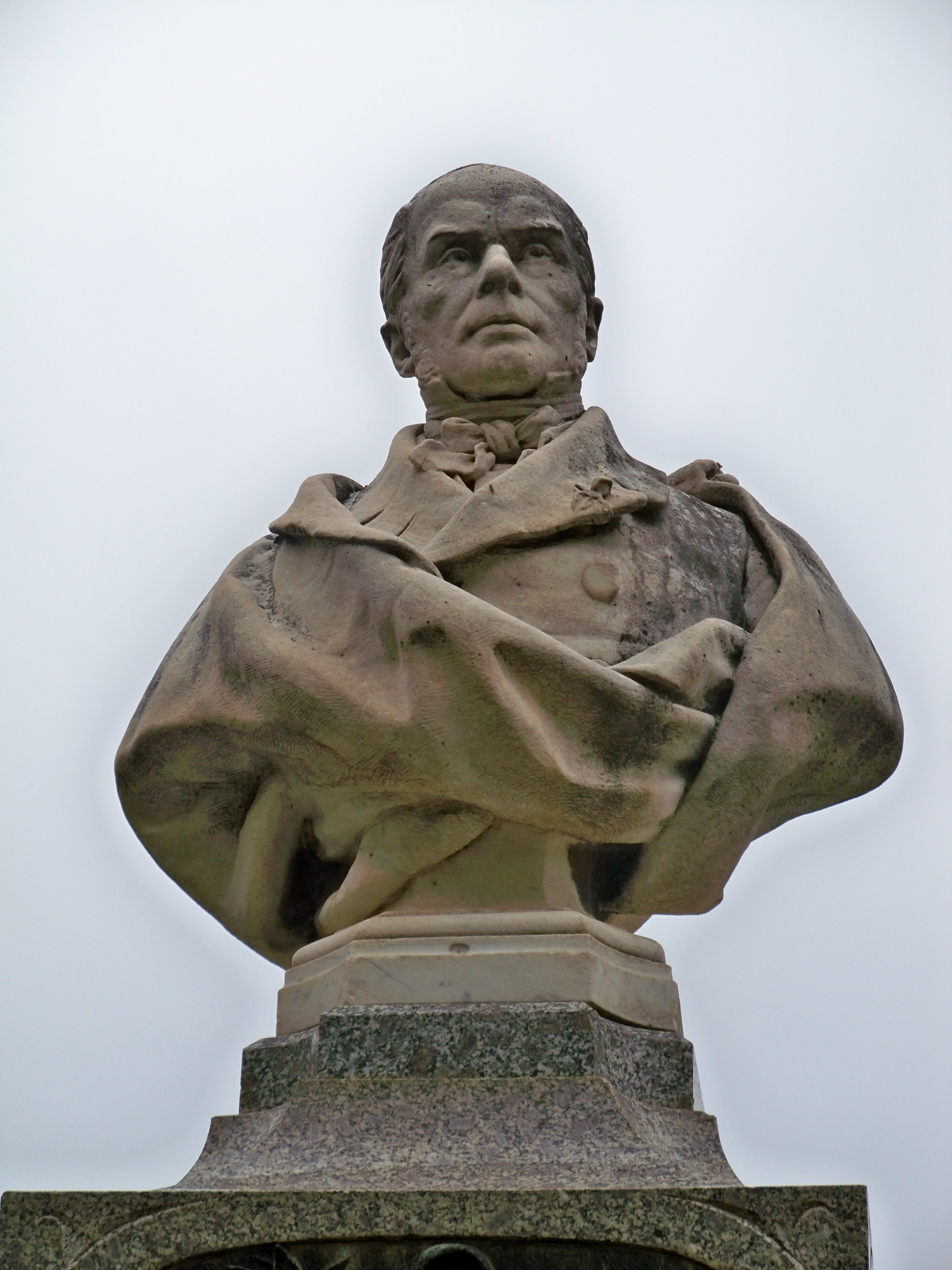 Joseph François Garnier, (1796-1865), maire de Neuilly (1843-1848) et fils du compositeur du même nom, Joseph François Garnier, Hauboïste Vauclusien, et Compositeur